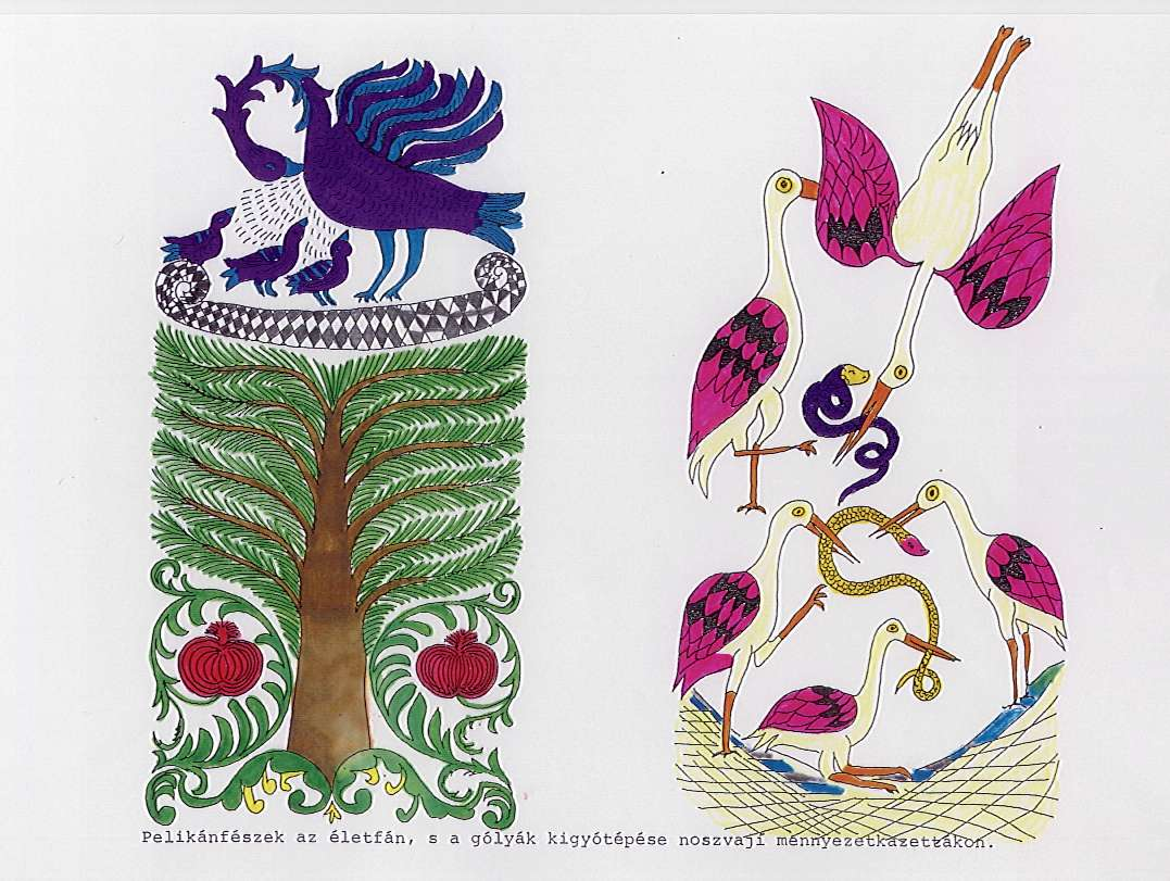 Két mennyezetkazetta Noszvajról